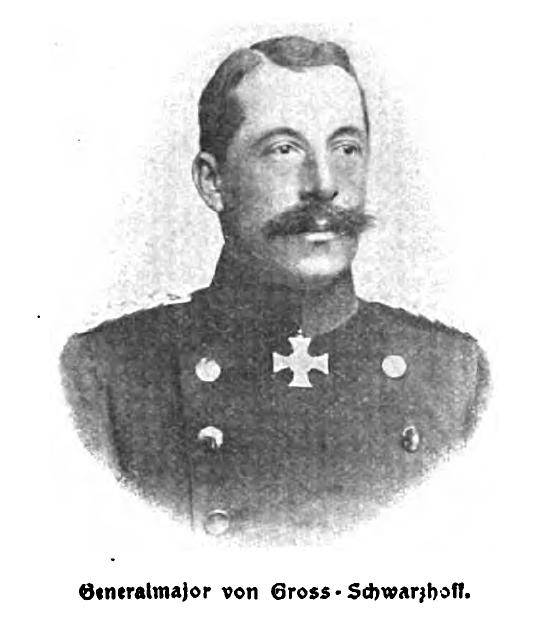 Julius Karl von Groß genannt von Schwarzhoff (* 7. September 1850 in Magdeburg; † 16. April 1901 in Peking) war kaiserlicher deutscher Generalmajor